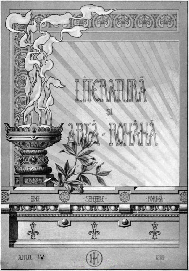 Literatură și artă română, cu subtitlul Idei, simțire, formă, a fost o revistă publicată la București, întemeiată de Dumitru C. Olănescu și Nicolae Petrașcu. Ea a apărut, cu intermitențe, între 25 noiembrie 1896 și 25 decembrie 1910, în condiții grafice excelente, sub conducerea lui Nicolae Petrașcu, care era editor și director.